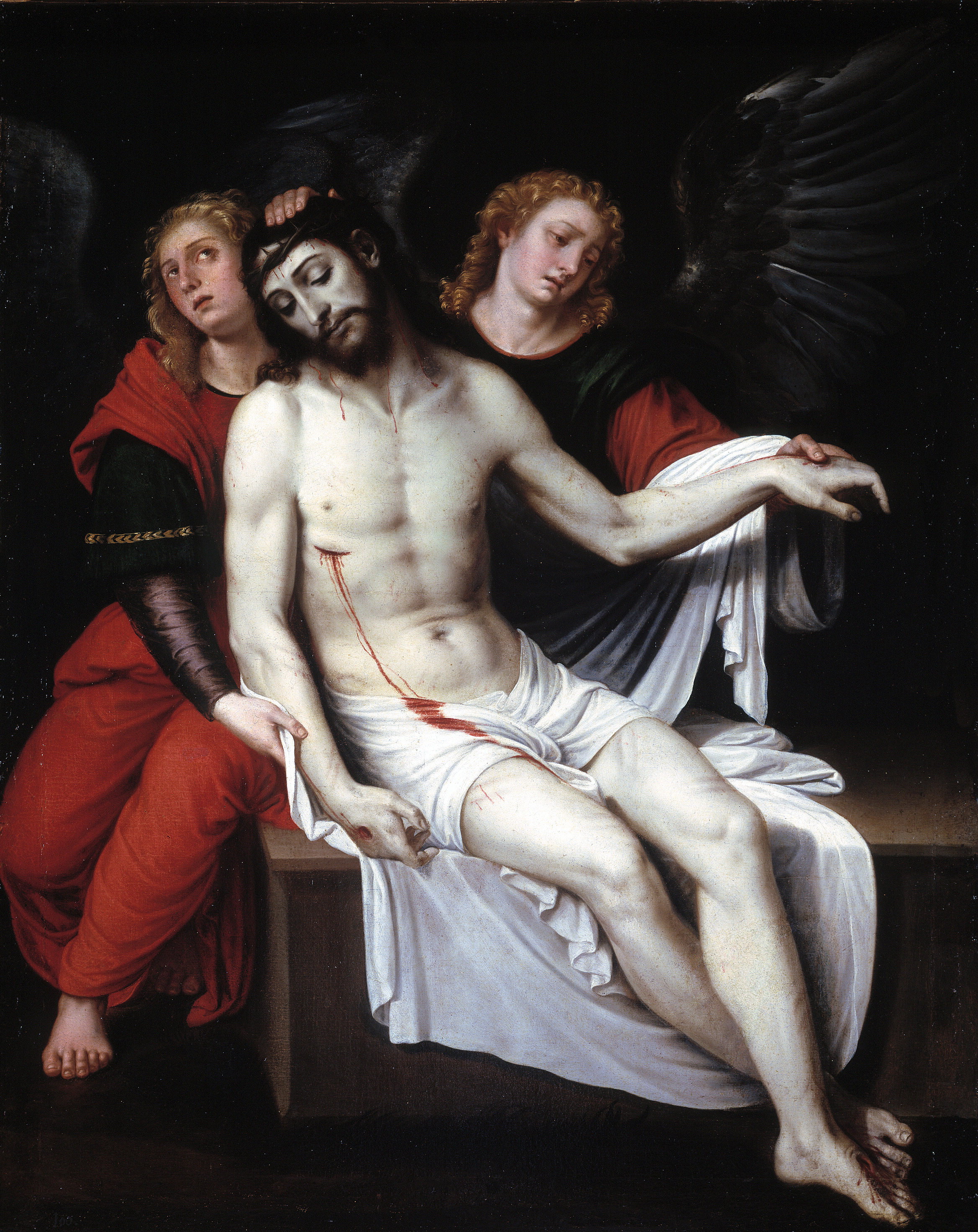 La obra representa a Jesucristo muerto y sostenido por dos ángeles.